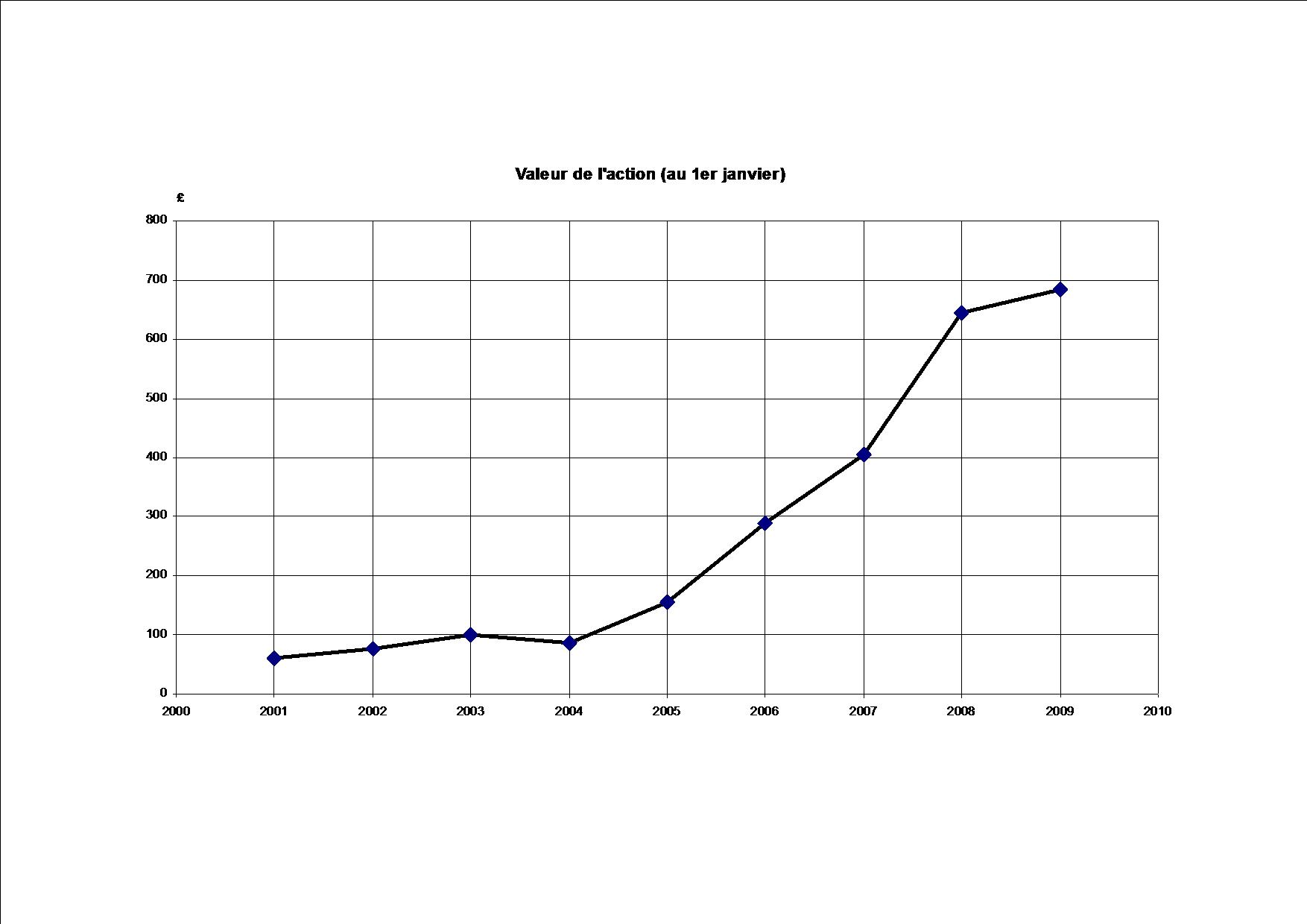 Evolution de la valeur de l'action Tullow Oil plc entre 2001 et 2009.